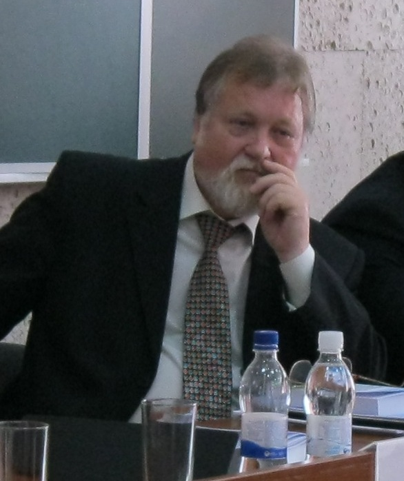 Андрейцев Володимир Іванович, український правознавець, під час конференції у Хмельницькому